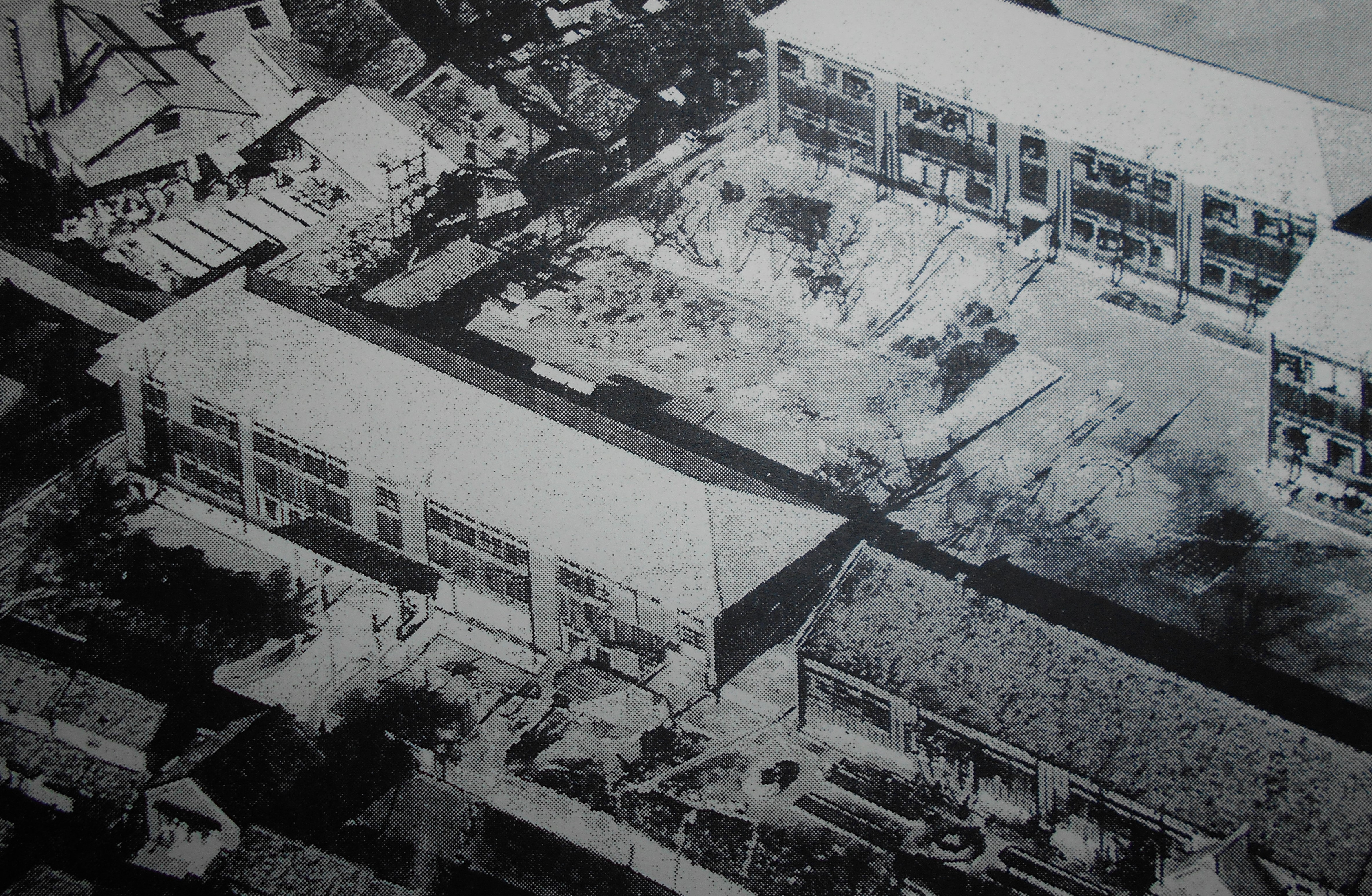 瀬戸市立深川小学校の敷地内にあった、瀬戸市中央公民館と瀬戸市立図書館を併設した建物（中央左）。